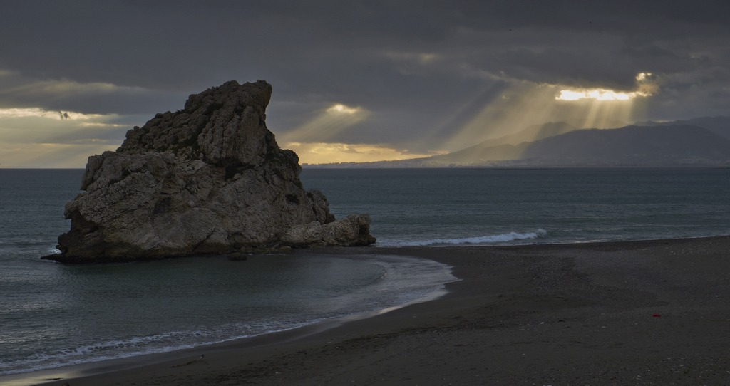 Peñón del Cuervo sunset.